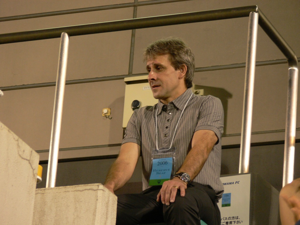 真上にいた！